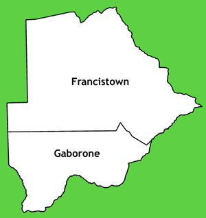 Mappa delle diocesi del Botswana. Lavoro personale, eseguito a partire da questa immagine di Commons. Fonte per i confini delle diocesi: Church Map in SACBC Guida delle missioni cattoliche 2005, a cura della Congregatio pro gentium evangelizatione, Roma, Urbaniana University Press, 2005 Categoria:Chiesa cattolica in Botswana